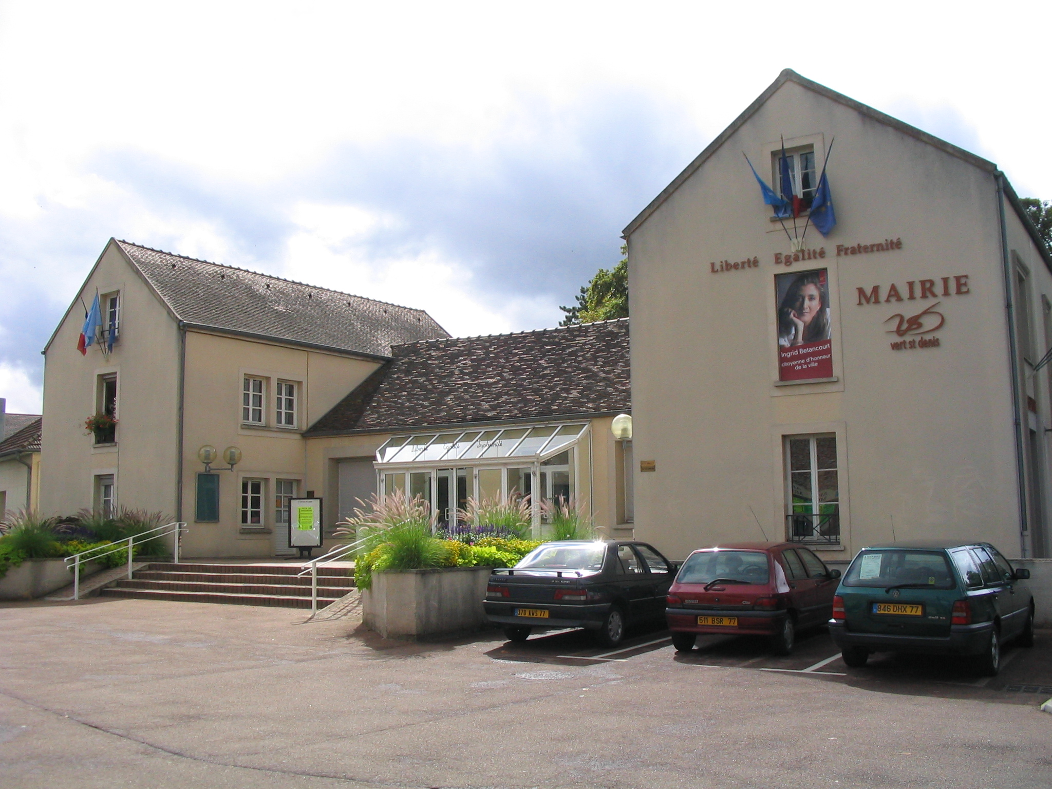 La mairie de Vert-Saint-Denis, en Seine-et-Marne.